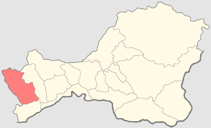 Бай-Тайгинский кожуун на карте Тывы